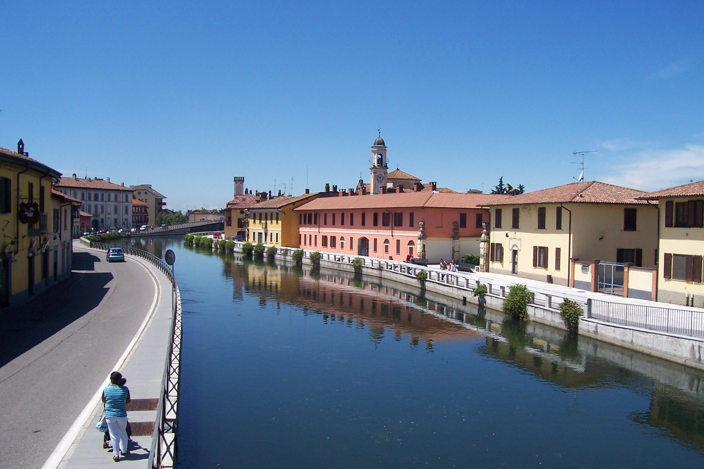 Il Naviglio Grande a Gaggiano. Sulla sinistra la strada provinciale 59.